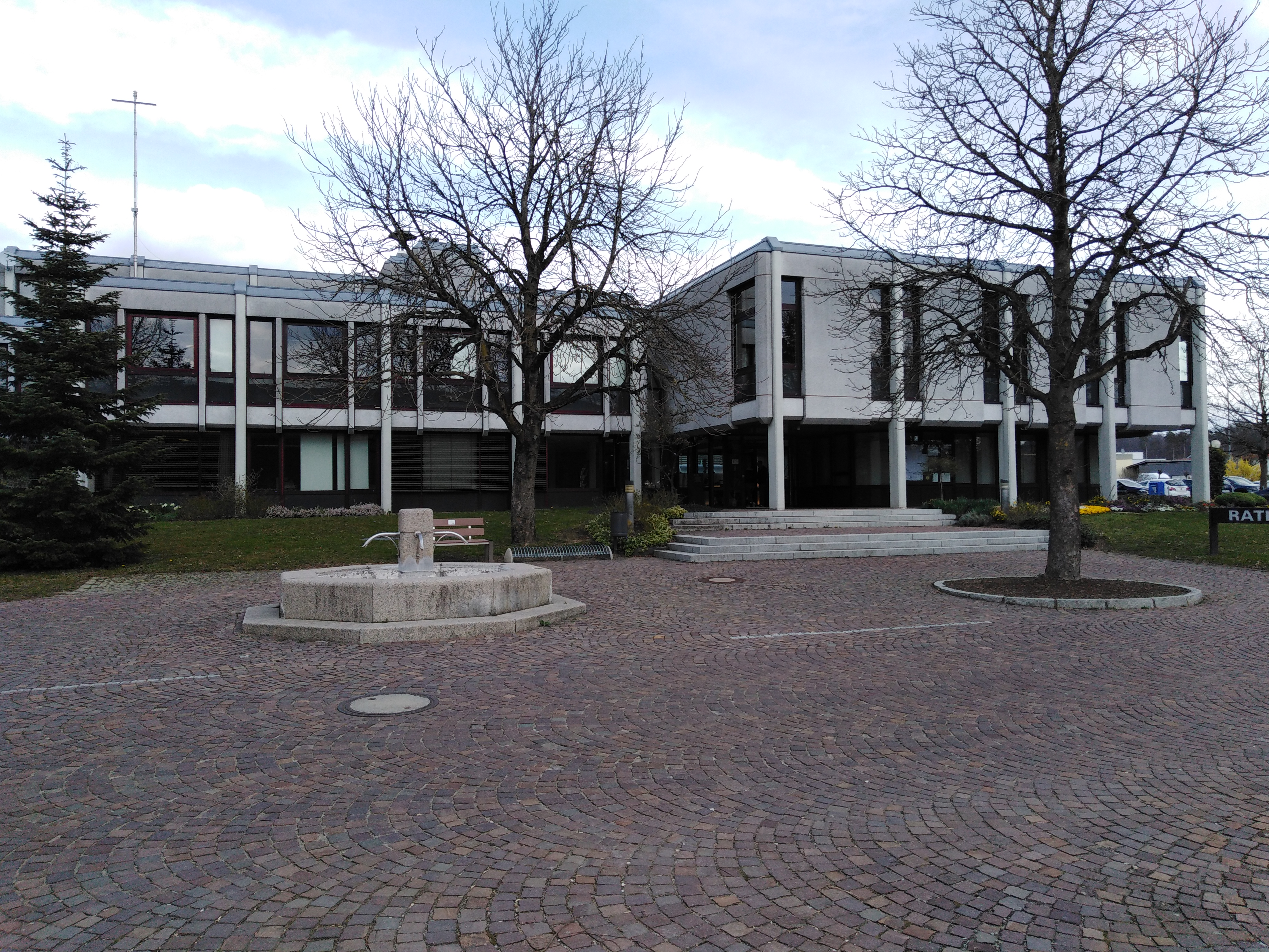 Lauchringen, Gemeinde im Landkreis Waldshut in Baden Württemberg. Rathaus der Gesamtgemeinde Lauchringen in Unterlauchringen.